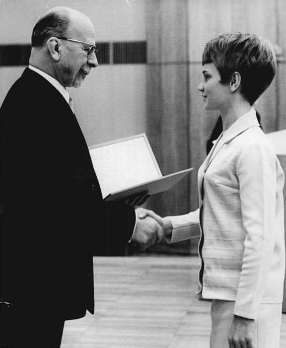 Zentralbild Brüggmann 21.11.1968 Berlin: Staatsrat ehrte am 8.11.1968 erfolgreiche DDR-Olympiamannschaft. Der Erste Sekretär des ZK der SED und Vorsitzende des Staatsrates der DDR, Walter Ulbricht, verlieh Karin Janz, Gewinnerin der Silbermedaille im Turnen am Stufenbarren, Gewinnerin einer Bronzemedaille in der Turnmannschaft der Frauen, Inhaberin eines 4. und eines 6. Platzes an weitern Turngeräten, bei den Olympischen Sommerspielen 1968 in Mexiko-Stadt, den "Vaterländischen Verdienstorden" in Silber.